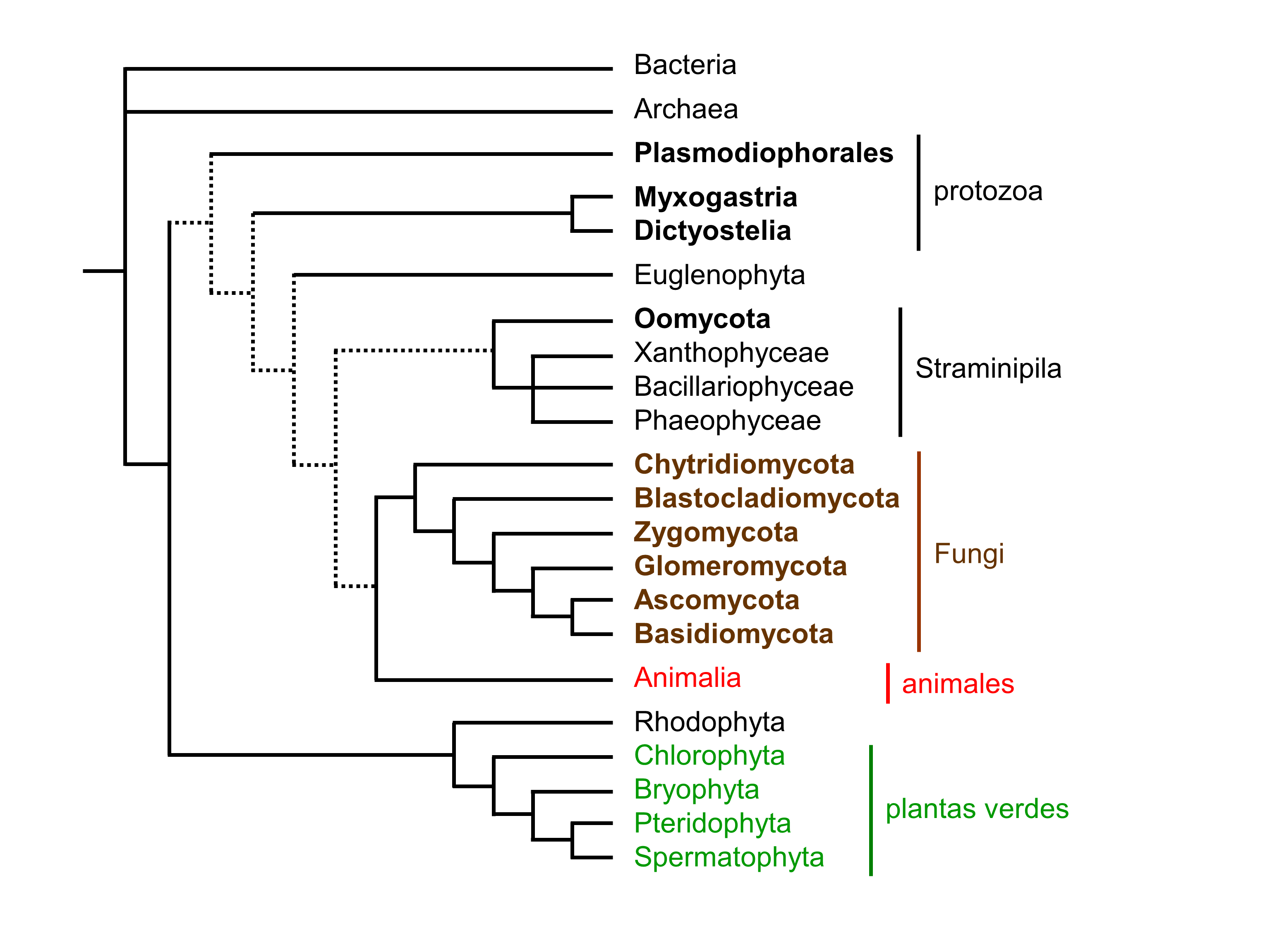 Biologische Schemata, gezeichnet und freigegeben von M. Piepenbring